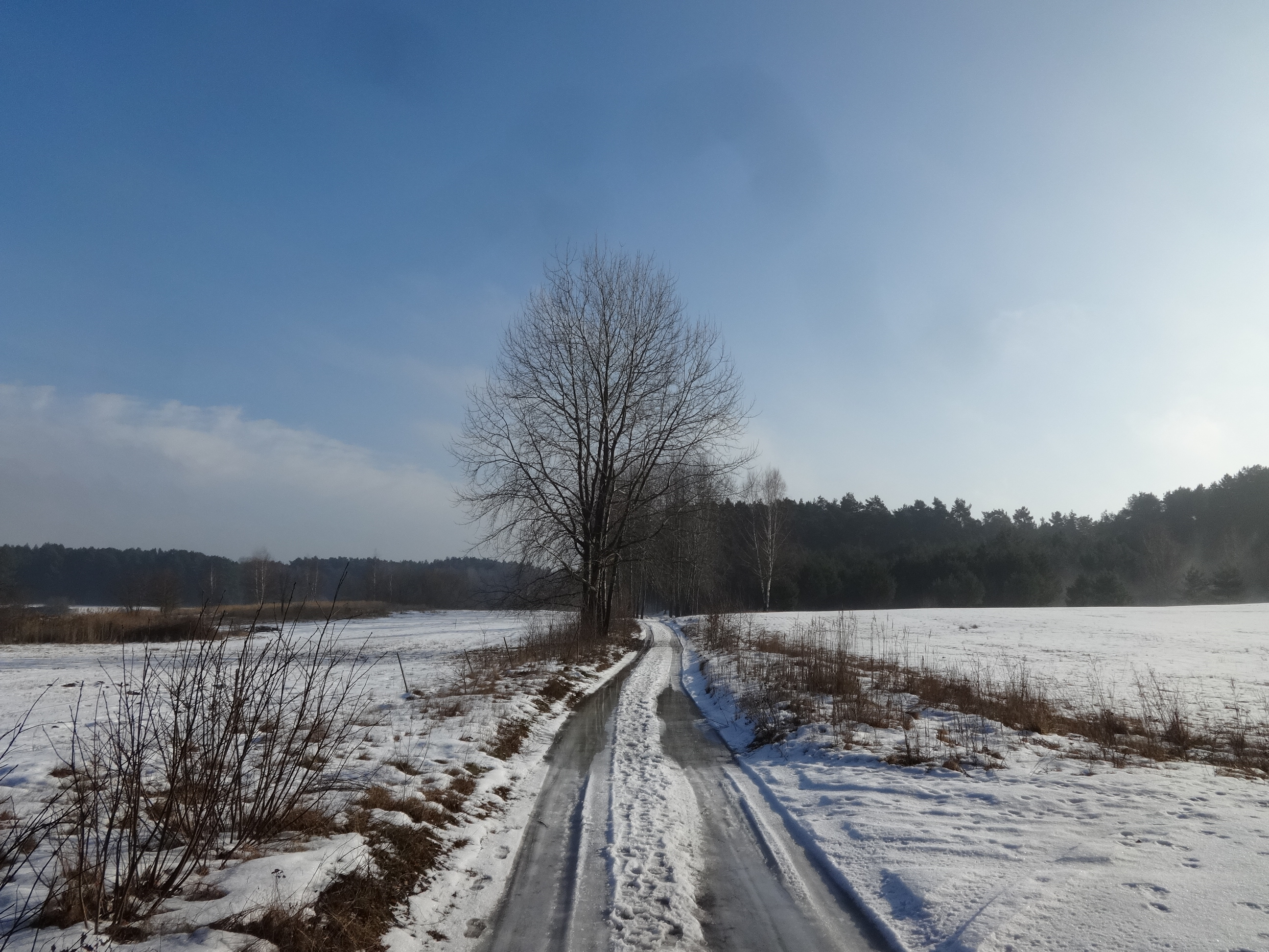 Blick von der Hohen Mühle nach Süden in das Naturschutzgebiet Mühlenfließ-Sägebach in Teupitz